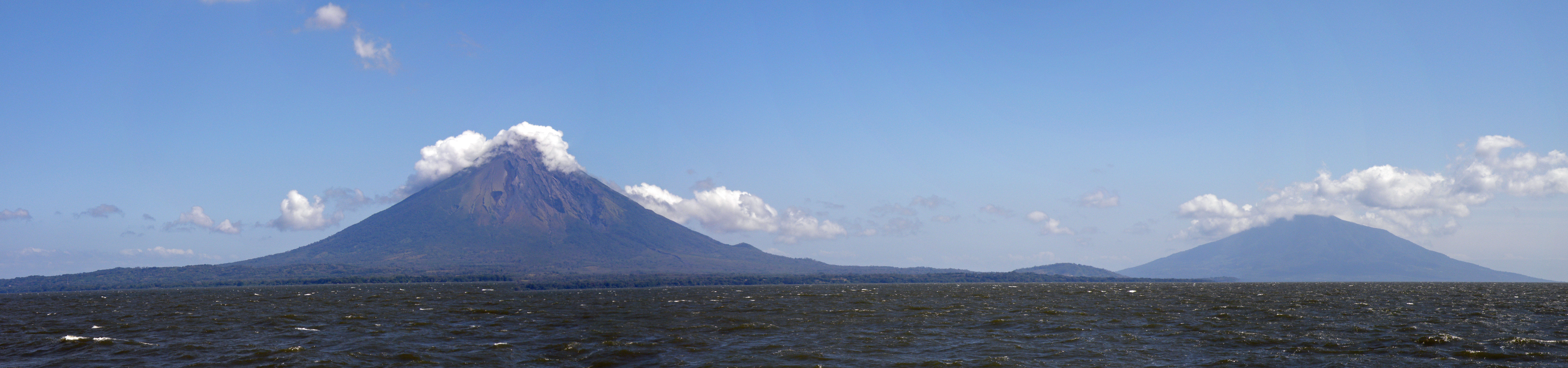 Vue panoramique sur l'île d'Ometepe.